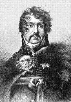 Ferdinand von Geramb (1772-1848), österreichischer Offizier, später Trappist